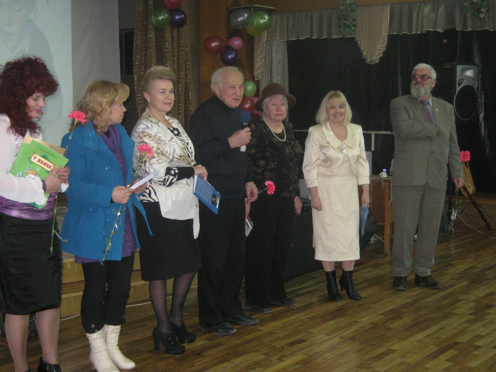 Члены Клуба крымских детских писателей на открытии Недели детского чтения